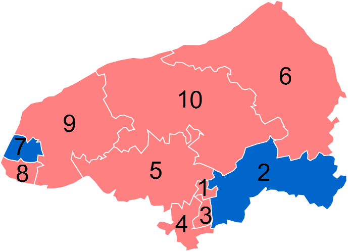 Résultats des élections législatives de la Seine-Maritime en 2012